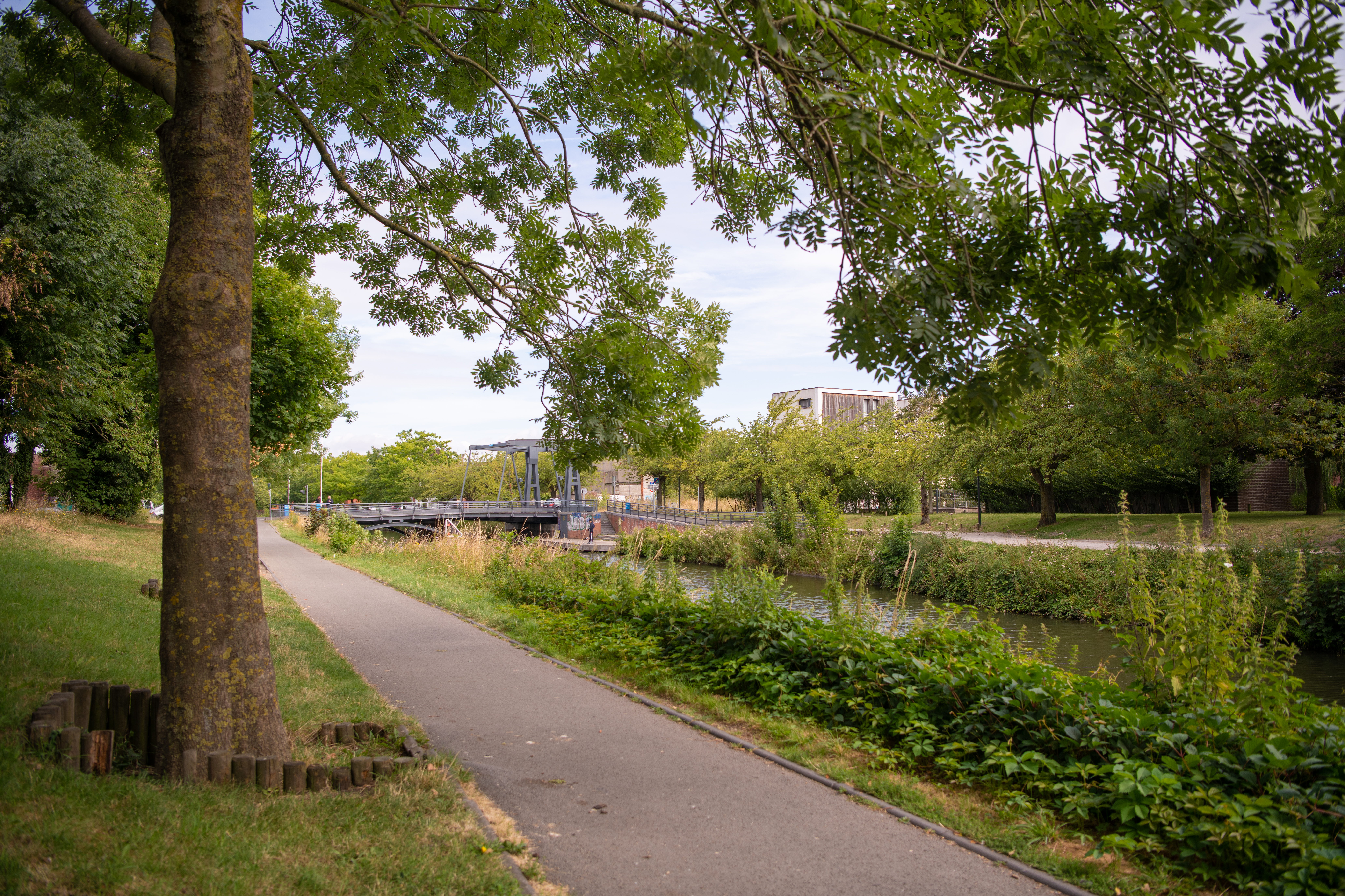 Le canal de Roubaix dans le quartier Oran Cartigny. Nature. Promenade. Flore. Trame Bleue. trame Verte.